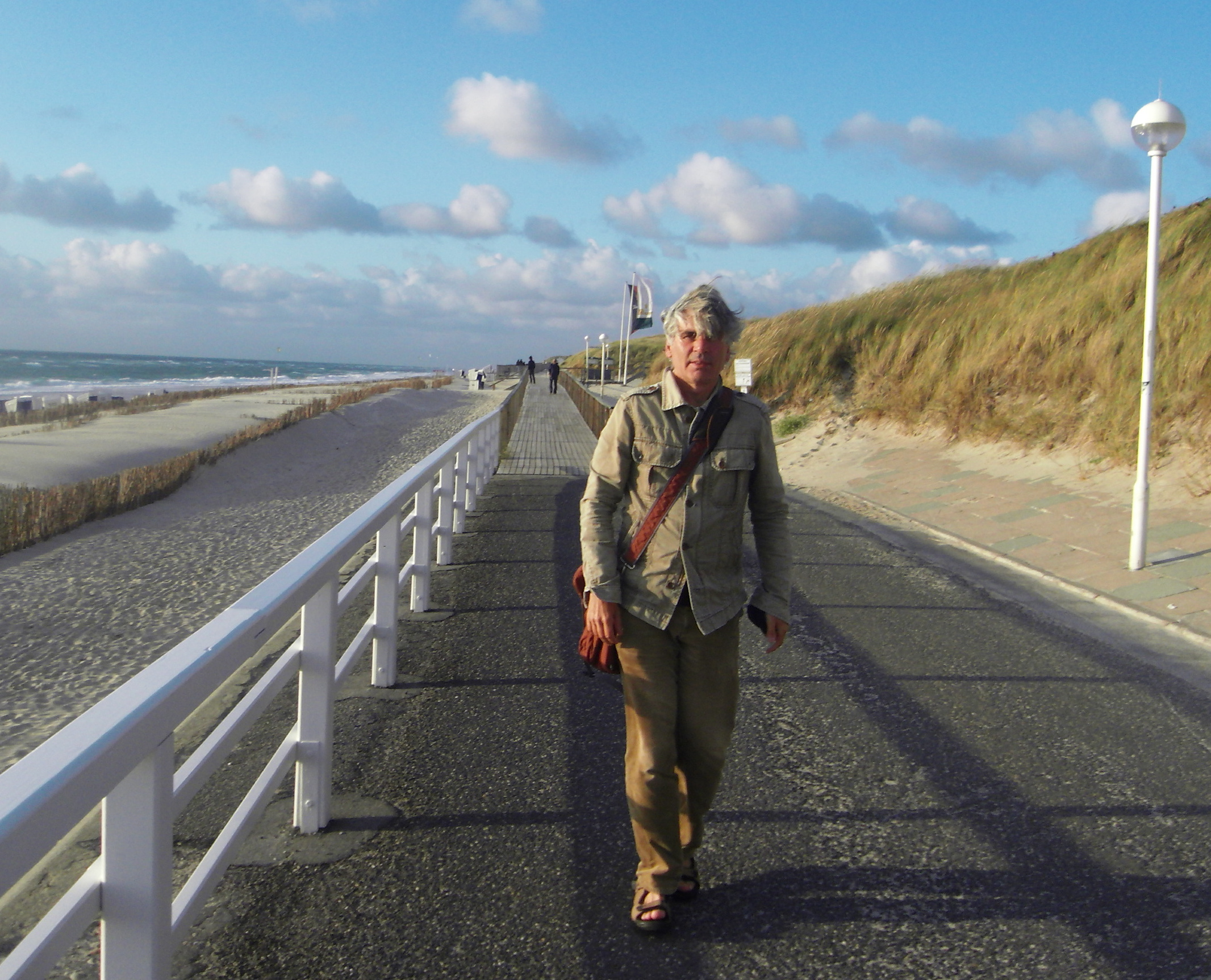 Porträt von Melanie S.